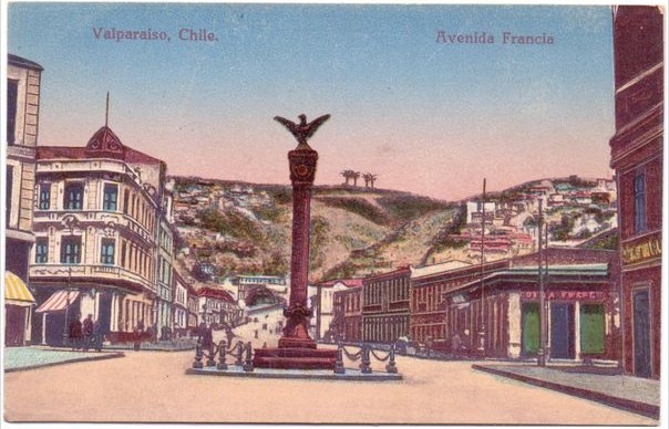 Postal que muestra la avenida Francia aproximadamente el año 1910